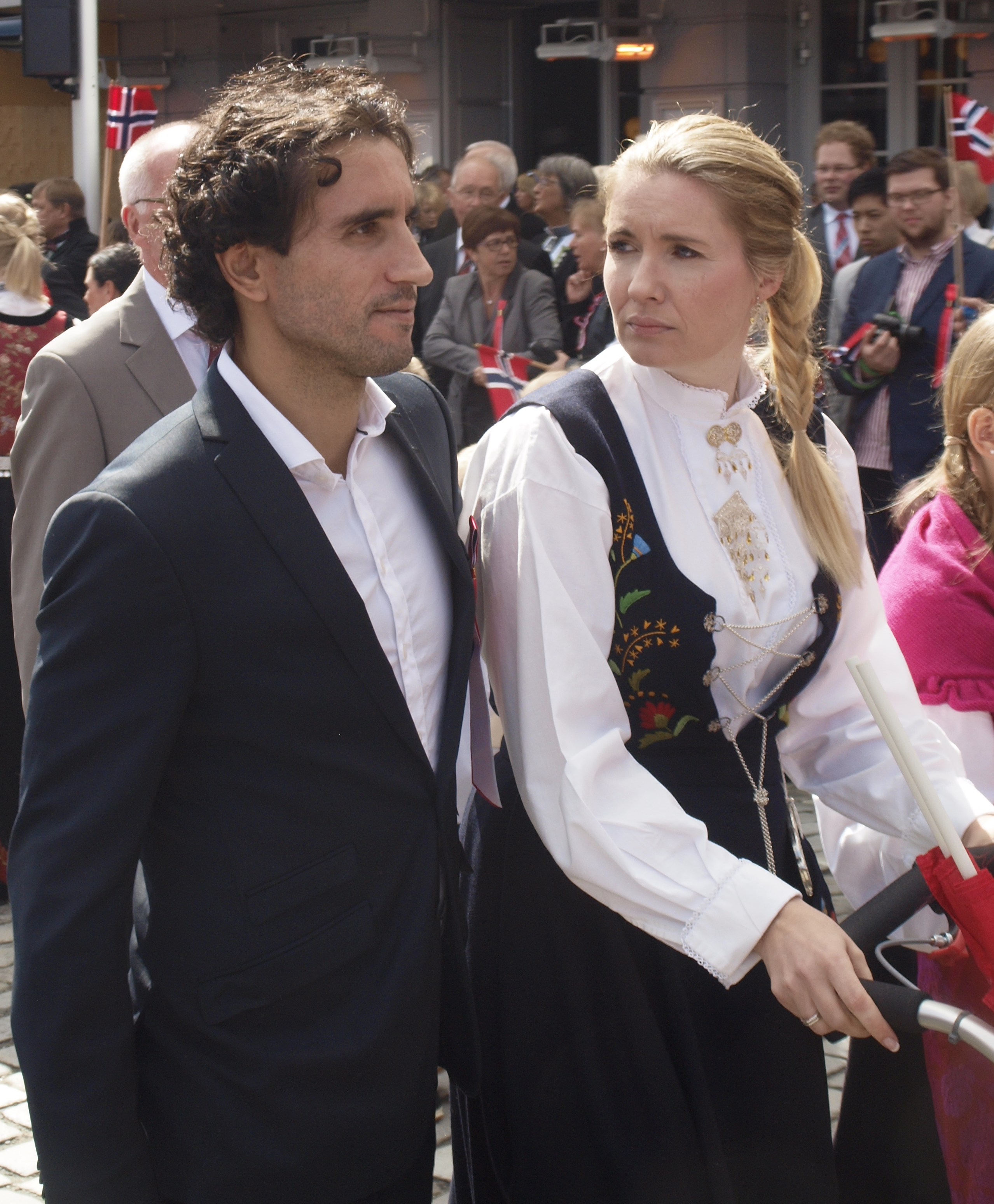 Hassan El Fakiri in 2014